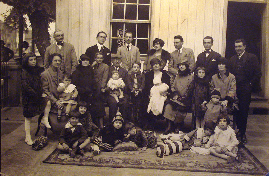 Família de João Paternoster e Marietina Sartori em torno de 1920